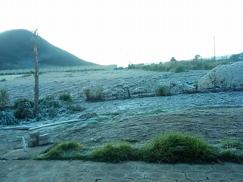 Helada fuerte en Écija, San Carlos Sija en enero del 2018